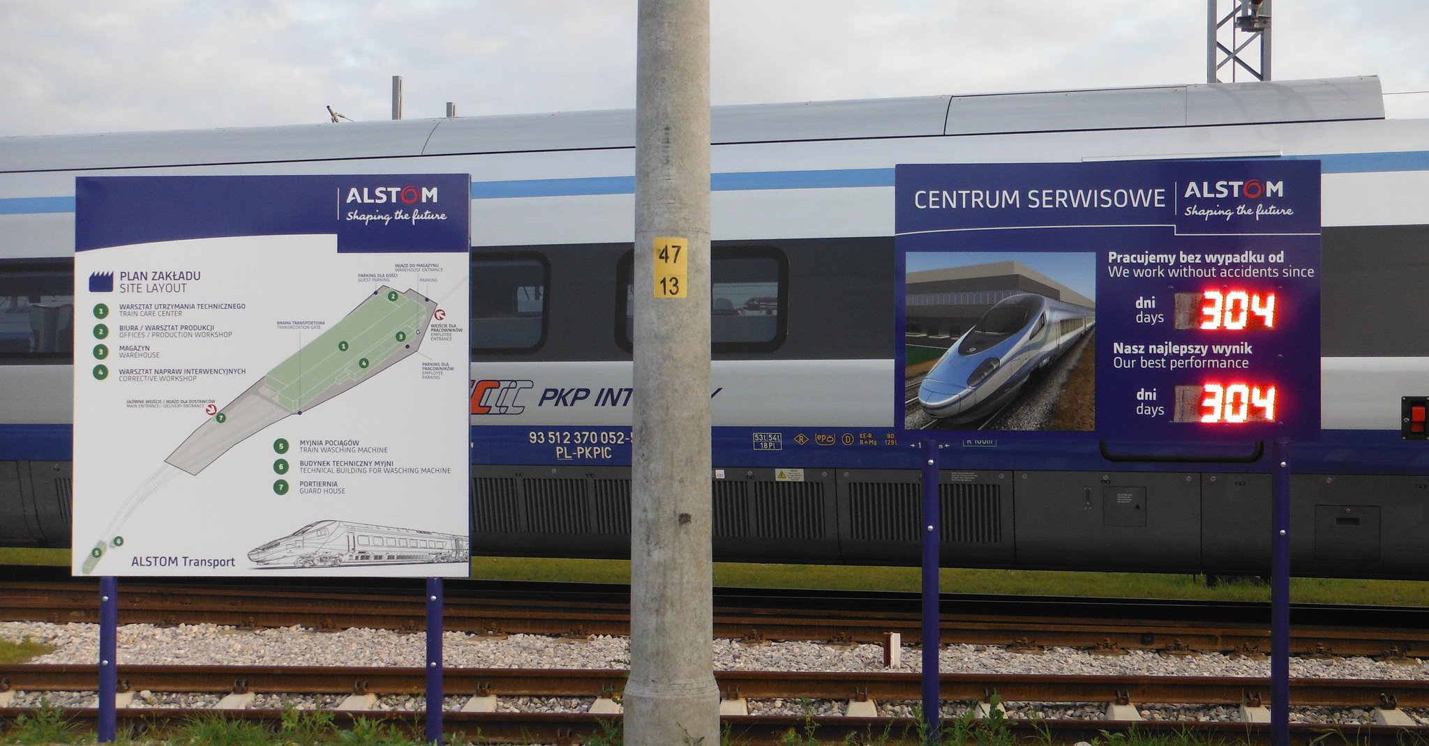 Pociągi Pendolino (Warszawa, Kozia Górka).